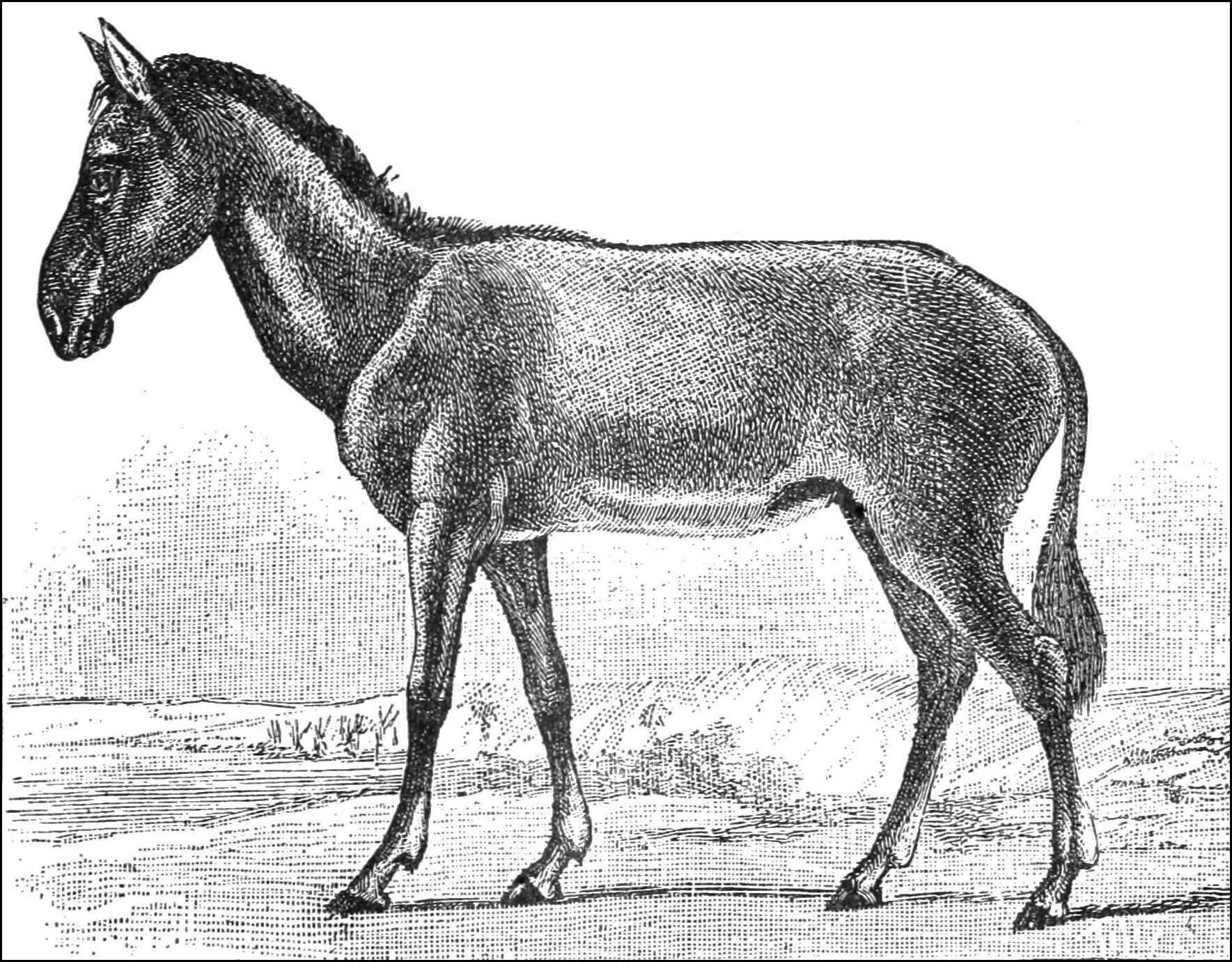 Syrian hemippus